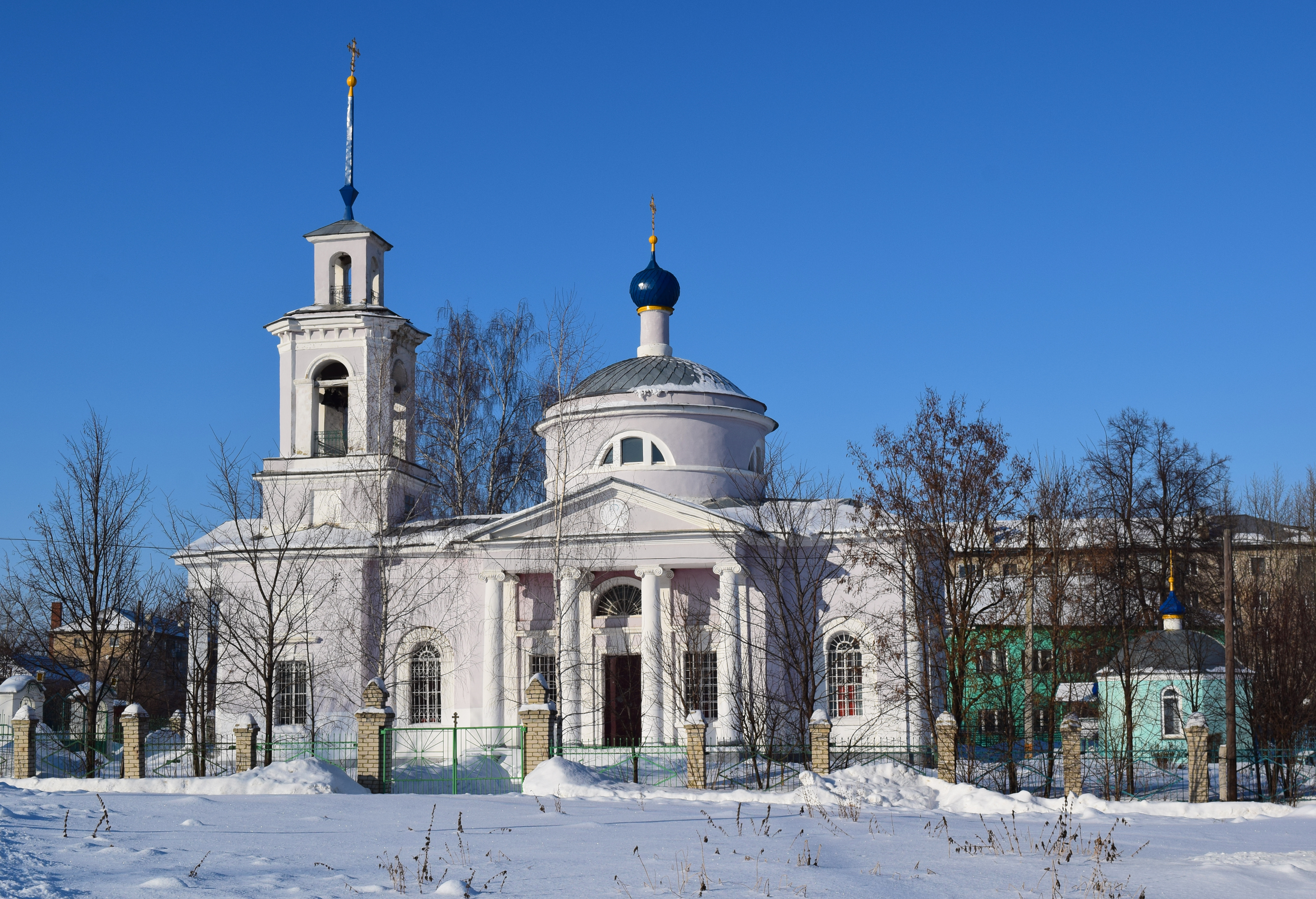 г.Скопин, Рязанская область